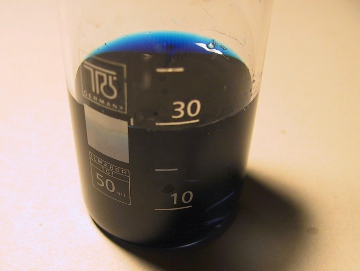 wässrige Methylenblau-Lösung